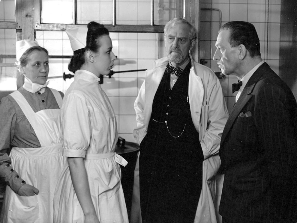 "Striden går vidare". Aurore Palmgren, Victor Sjöström, Carl Ström. Regi Gustaf Molander.5/41-24